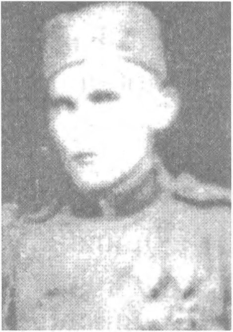 Српски (ћирилица): Милан Чакширан, првоборац, народни херој и комадндант чете